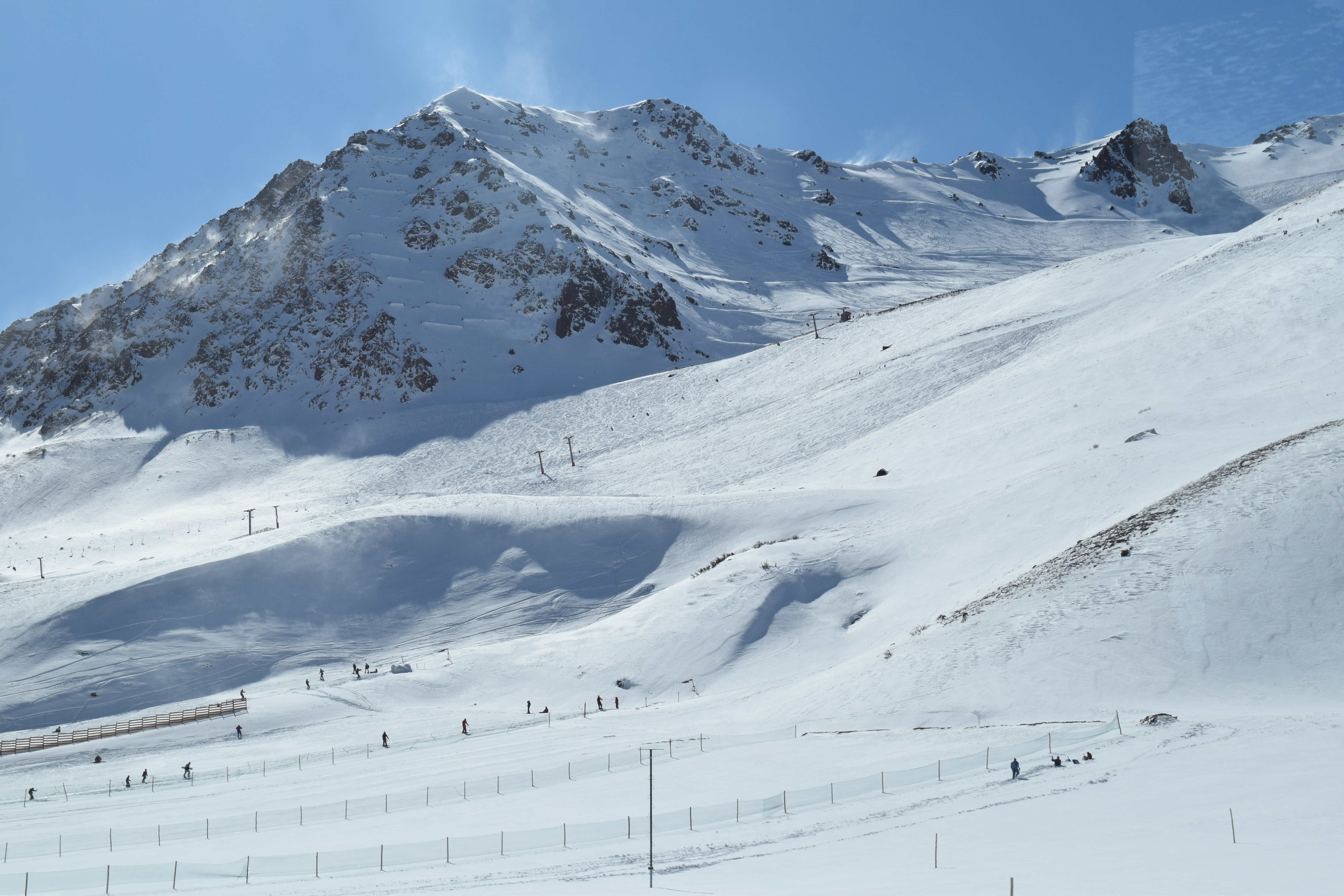 Centro de esquí de Los Penitentes, en la provincia de Mendoza, Argentina.